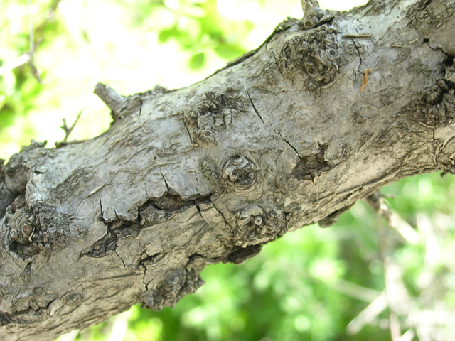 Kora drveta vrste Pyracantha coccinea Röm; fotografija: E.coli